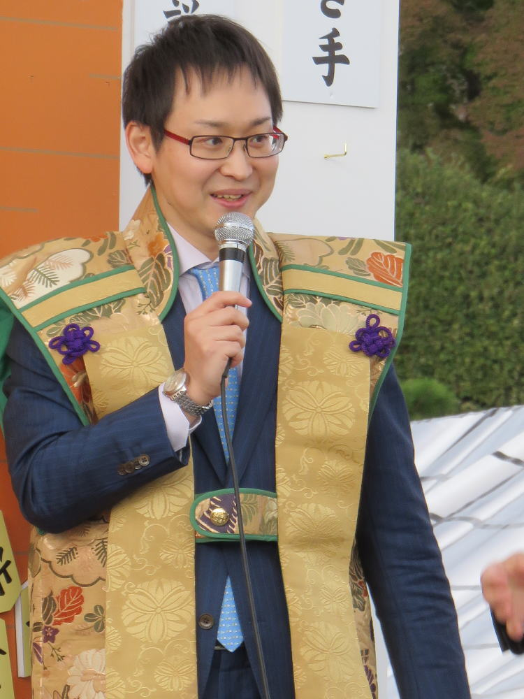 将棋棋士の山崎隆之（平成２９年１１月、姫路市で行われた人間将棋にて）